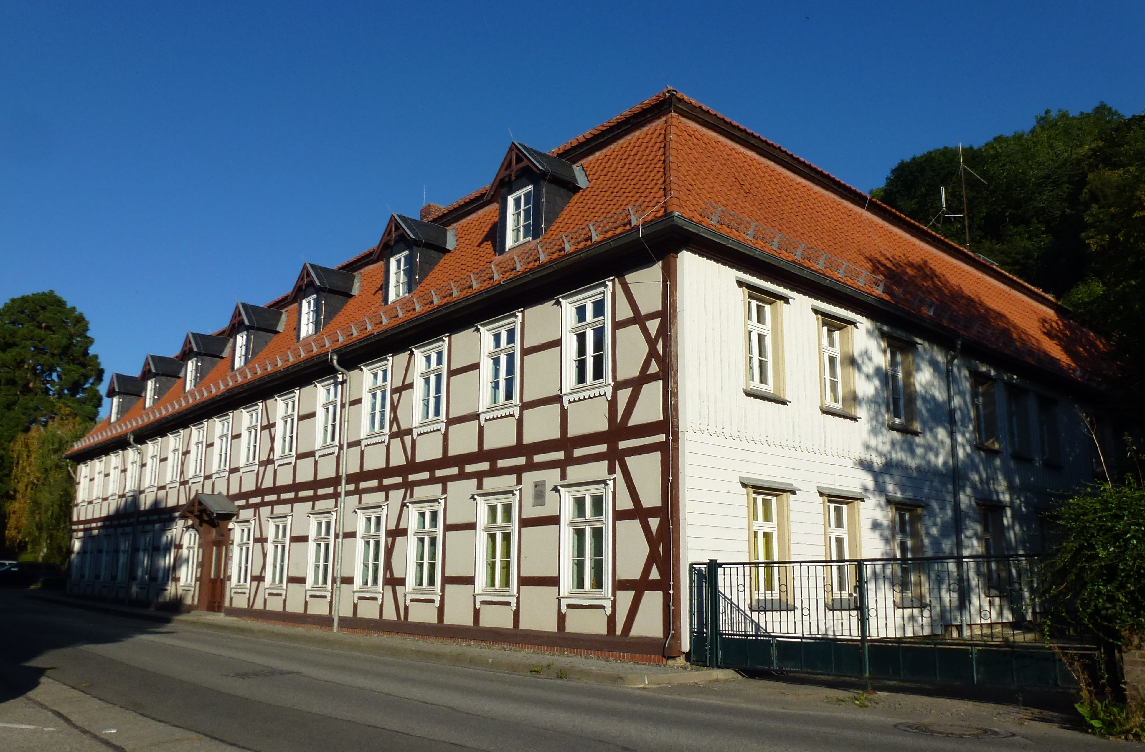 Das denkmalgeschützte Haus Lindenallee 35 in Wernigerode, Sitz der Nationalparkverwaltung. Erbaut 1736-1737 als Waisenhaus